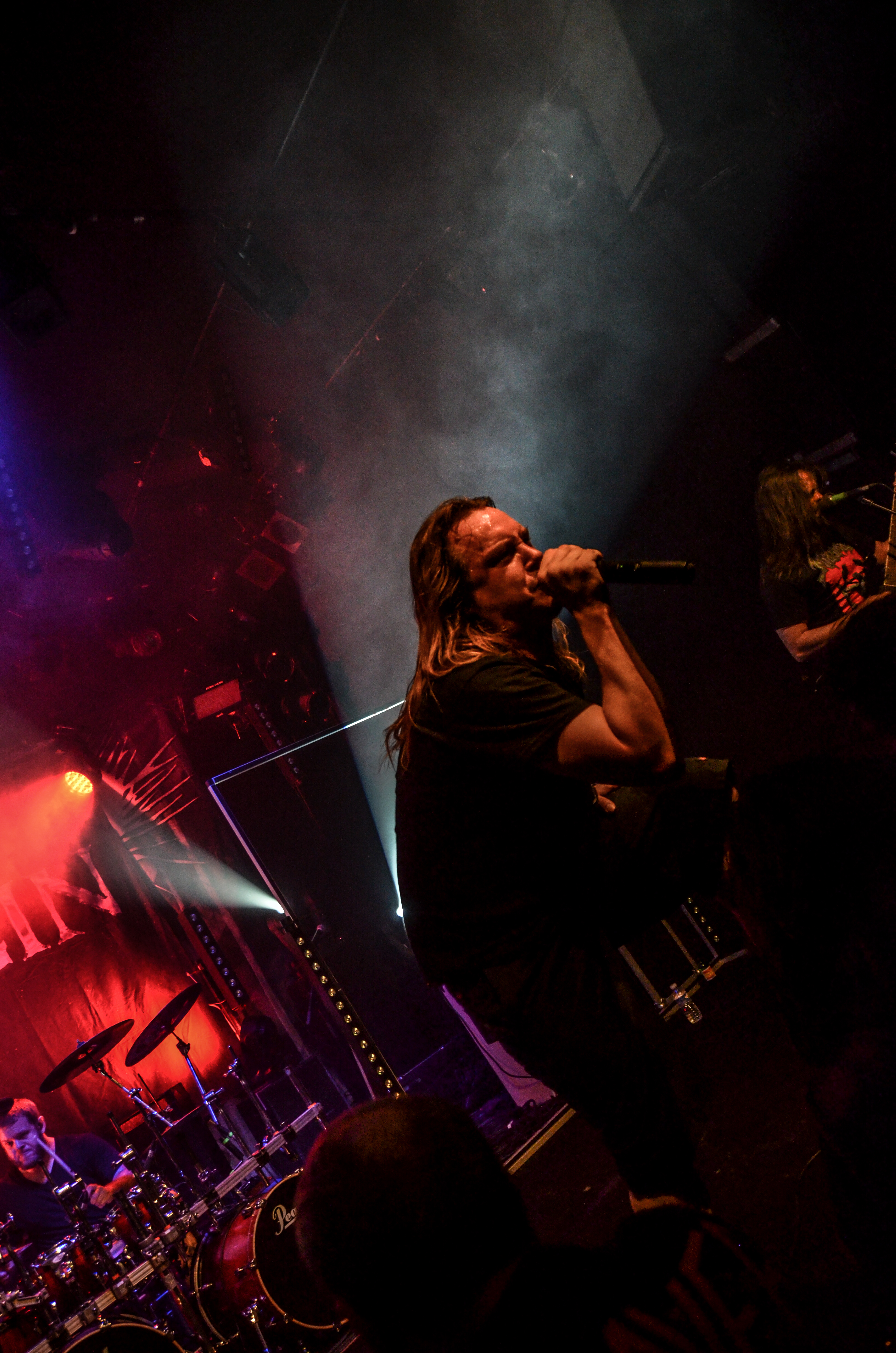 Origin en Concert au Grillen de Colmar le 15/12/2014